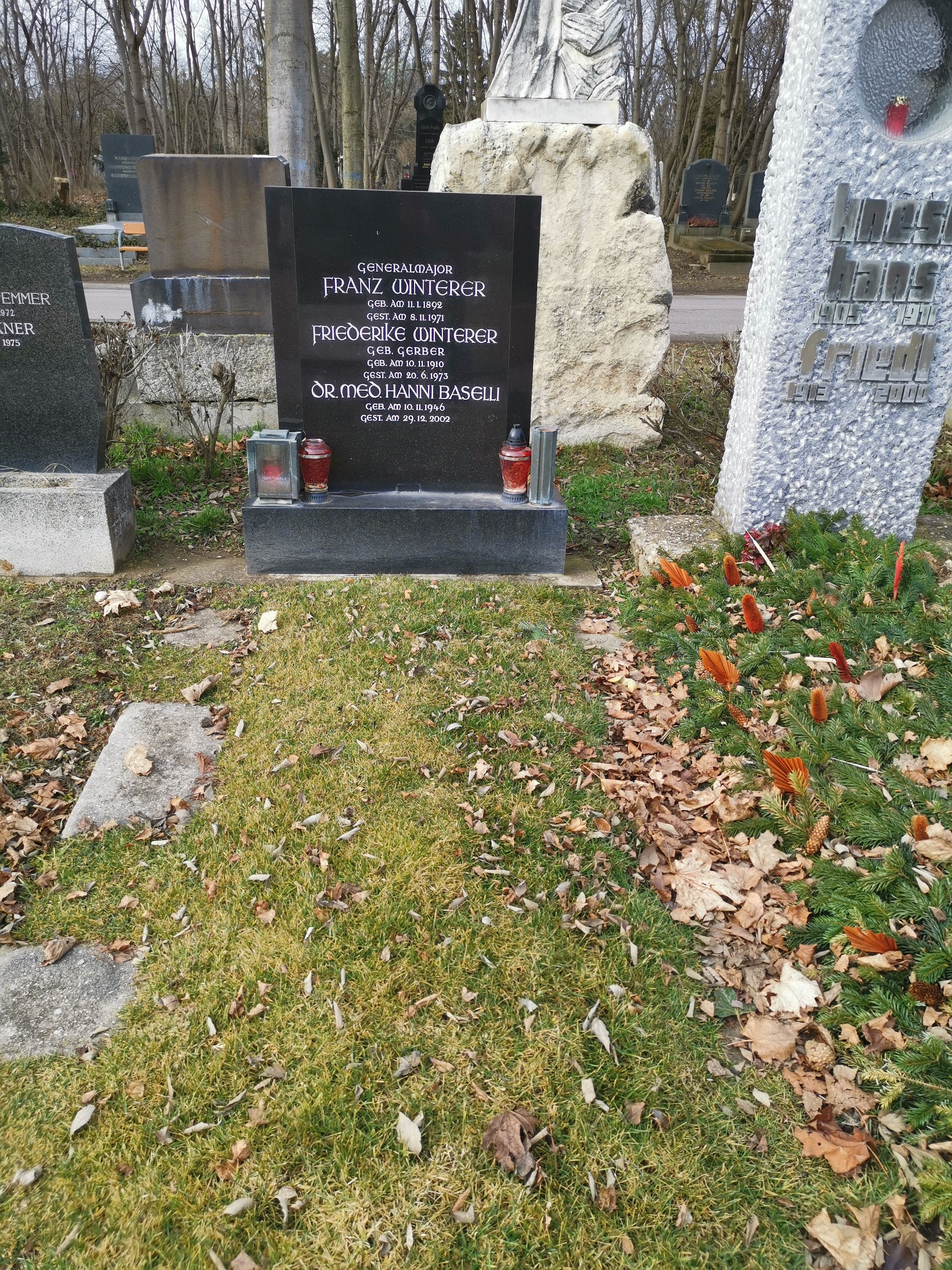 Grab von Franz Winterer auf dem Wiener Zentralfriedhof